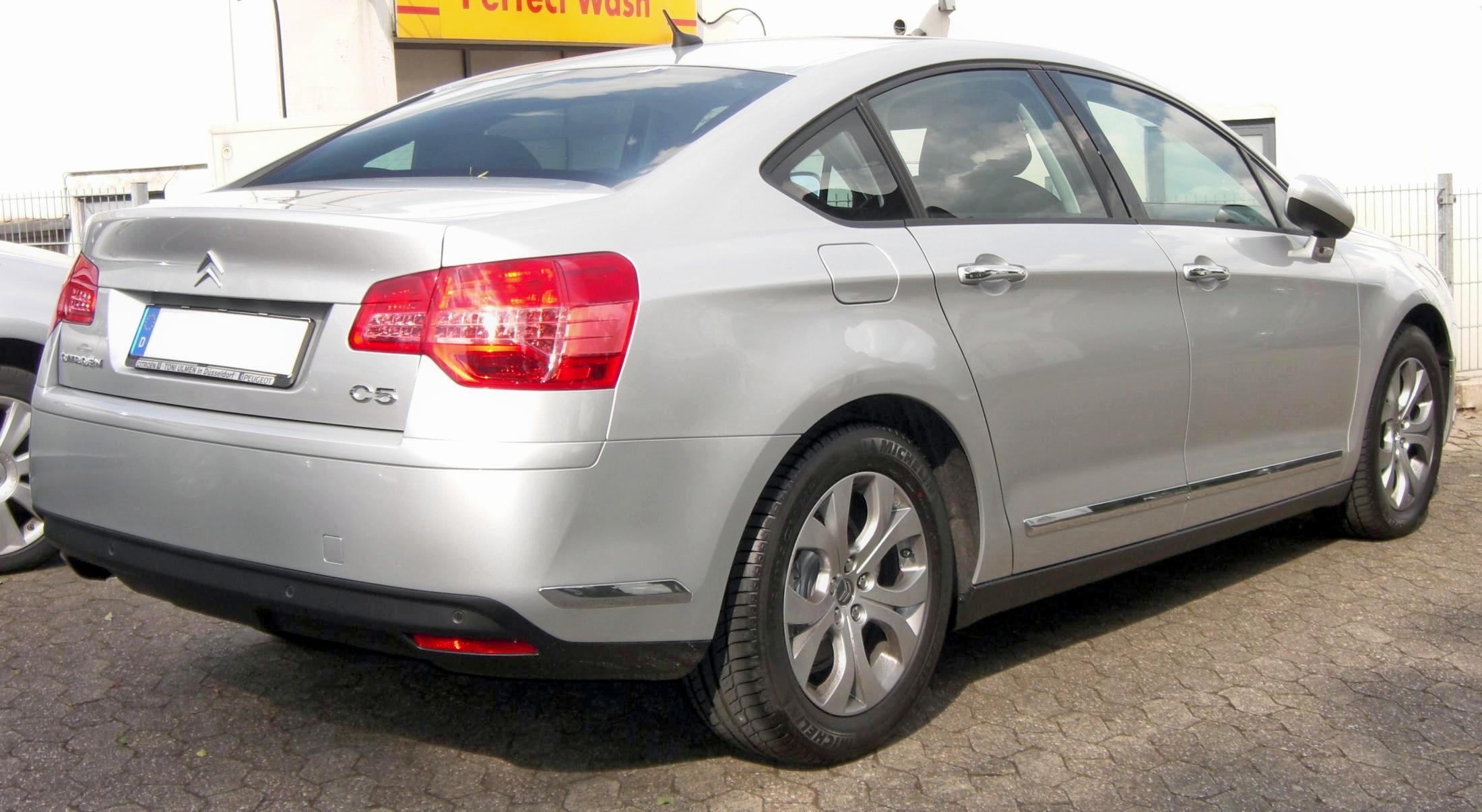 Citroen C5